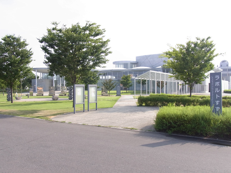 lapolte suzu